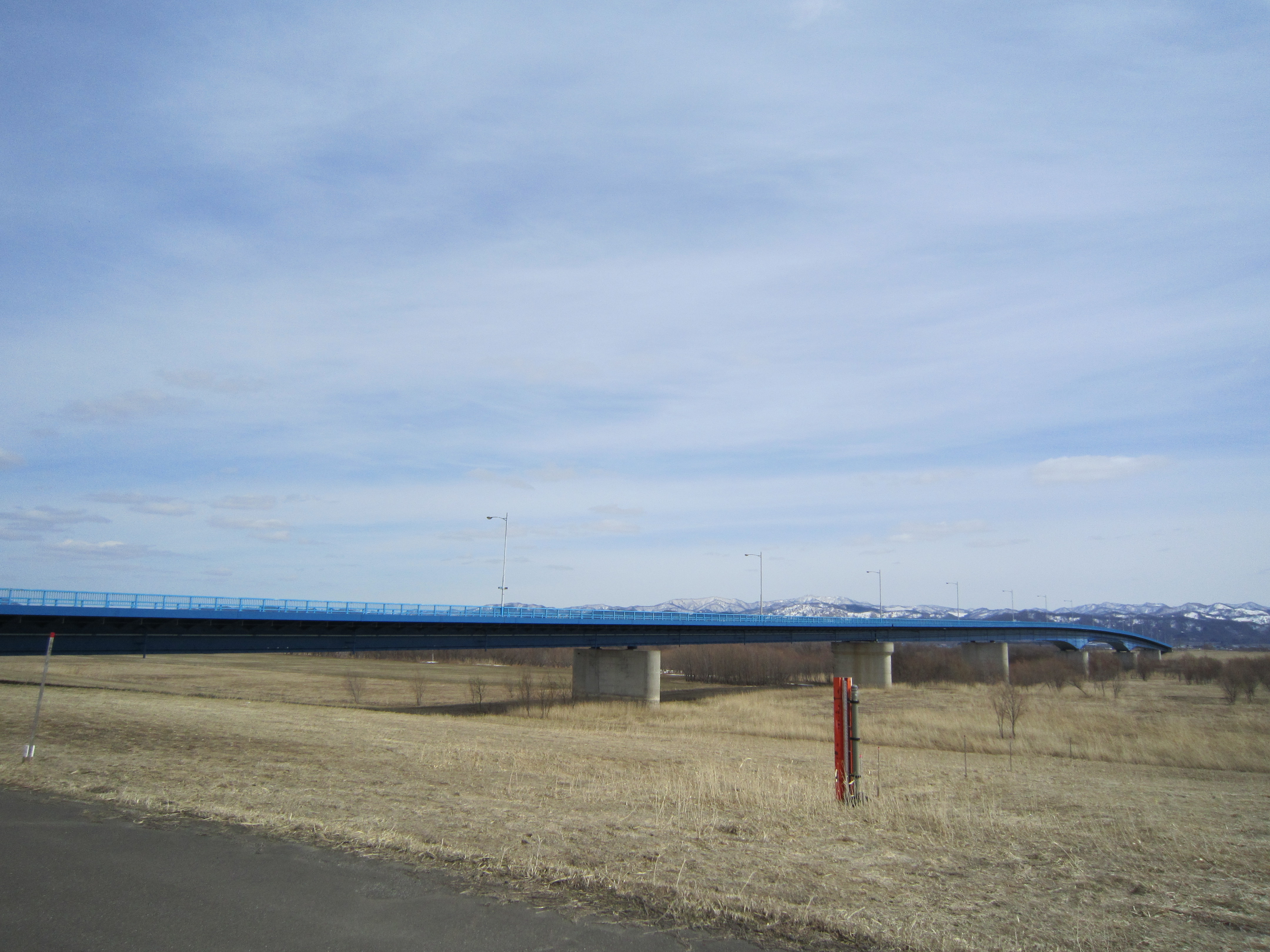 石狩川に架かる奈井江大橋。右岸より上流側を望む